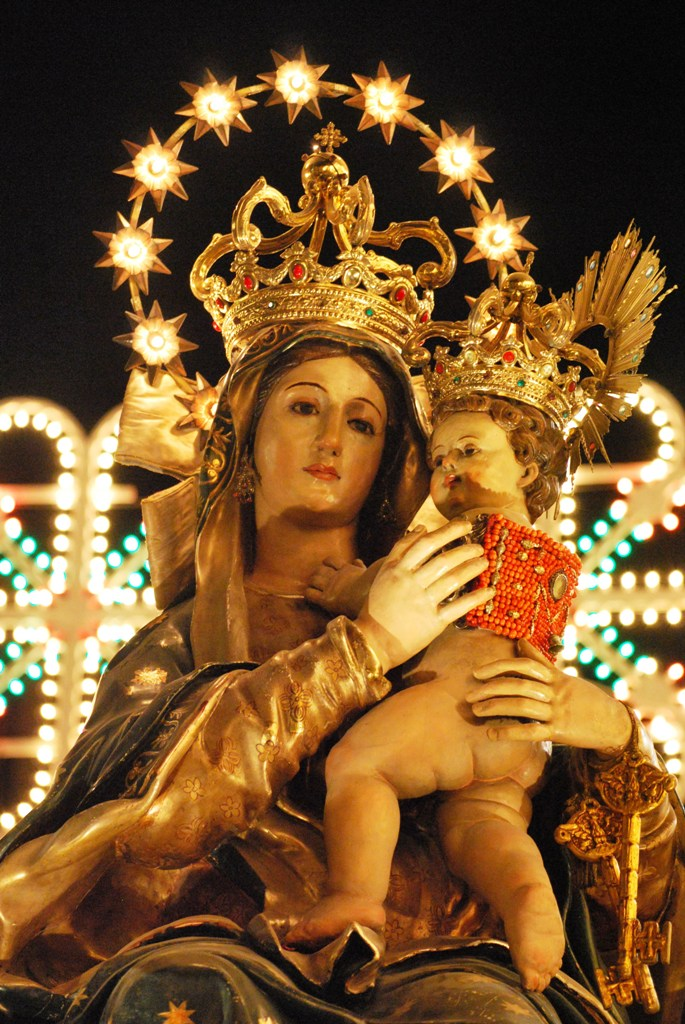 Processione di Maria Santissima dei Miracoli ad Alcamo (2010)